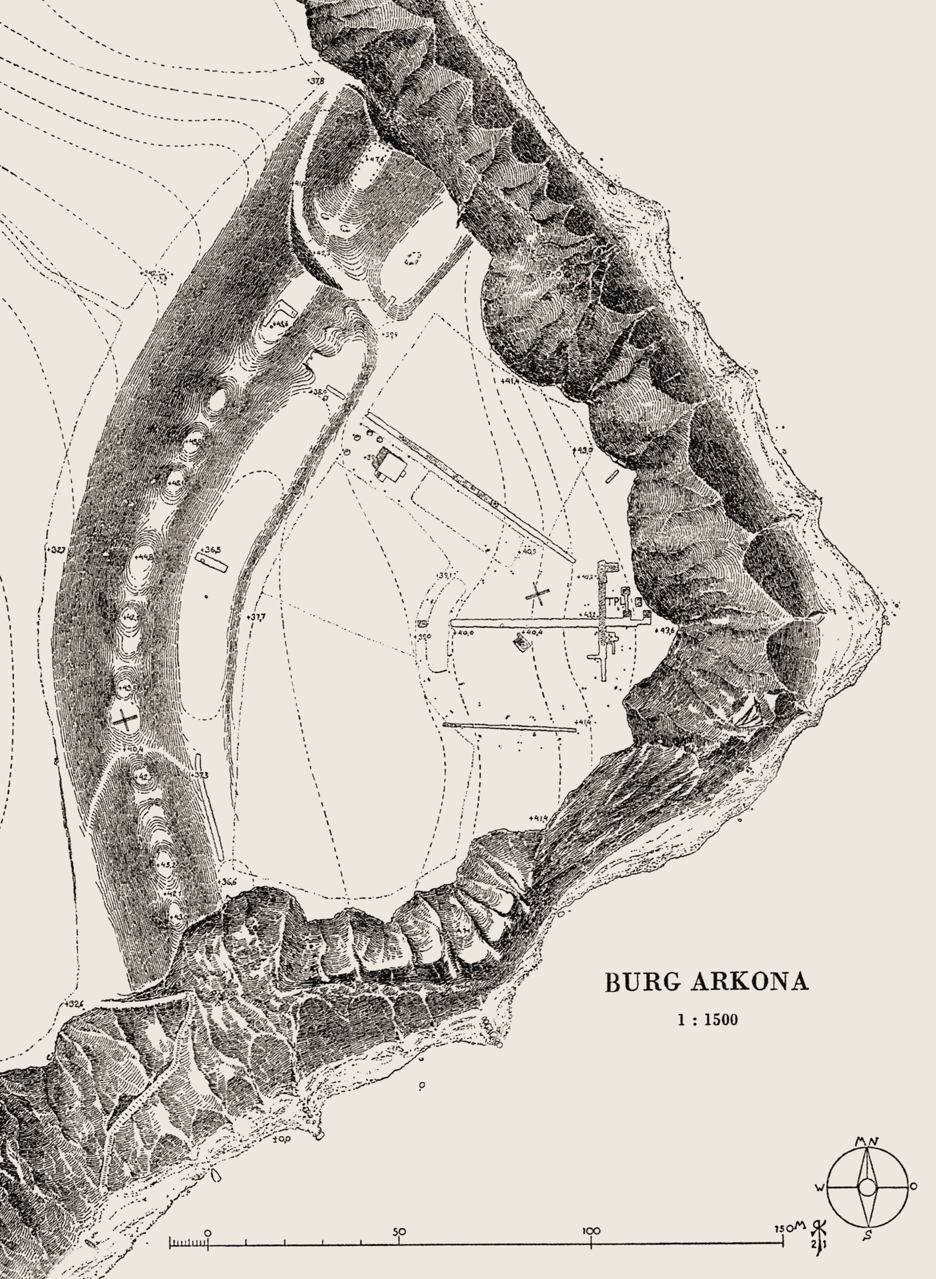 Robert Koldewey fertigte diese Zeichnung an, als er 1921 an den Ausgrabungen von Carl Schuchhardt und dessen Sohn Walter-Herwig Schuchhardt in der slawischen Wallburg am Kap Arkona (Jaromarsburg) teilnahm. Er dokumentierte hiermit die angelegten archäologischen Grabungsschnitte, zugleich aber auch die Standorte der beiden Baken zur Kennzeichnung des Arkona-Riffs als gefährliche Untiefe und die kreisförmige Anordnung der acht Antennenträgermasten der Funknebelsignalversuchsstation, mit der im Jahr 1912 Versuche zur Nutzbarmachung der Hertzschen Wellen im Nebelsignaldienst unternommen wurden. Sein Signum, das er auch auf anderen seiner Zeichnungen verwendet hat, befindet sich mit der Jahreszahl „21“ unten rechts.